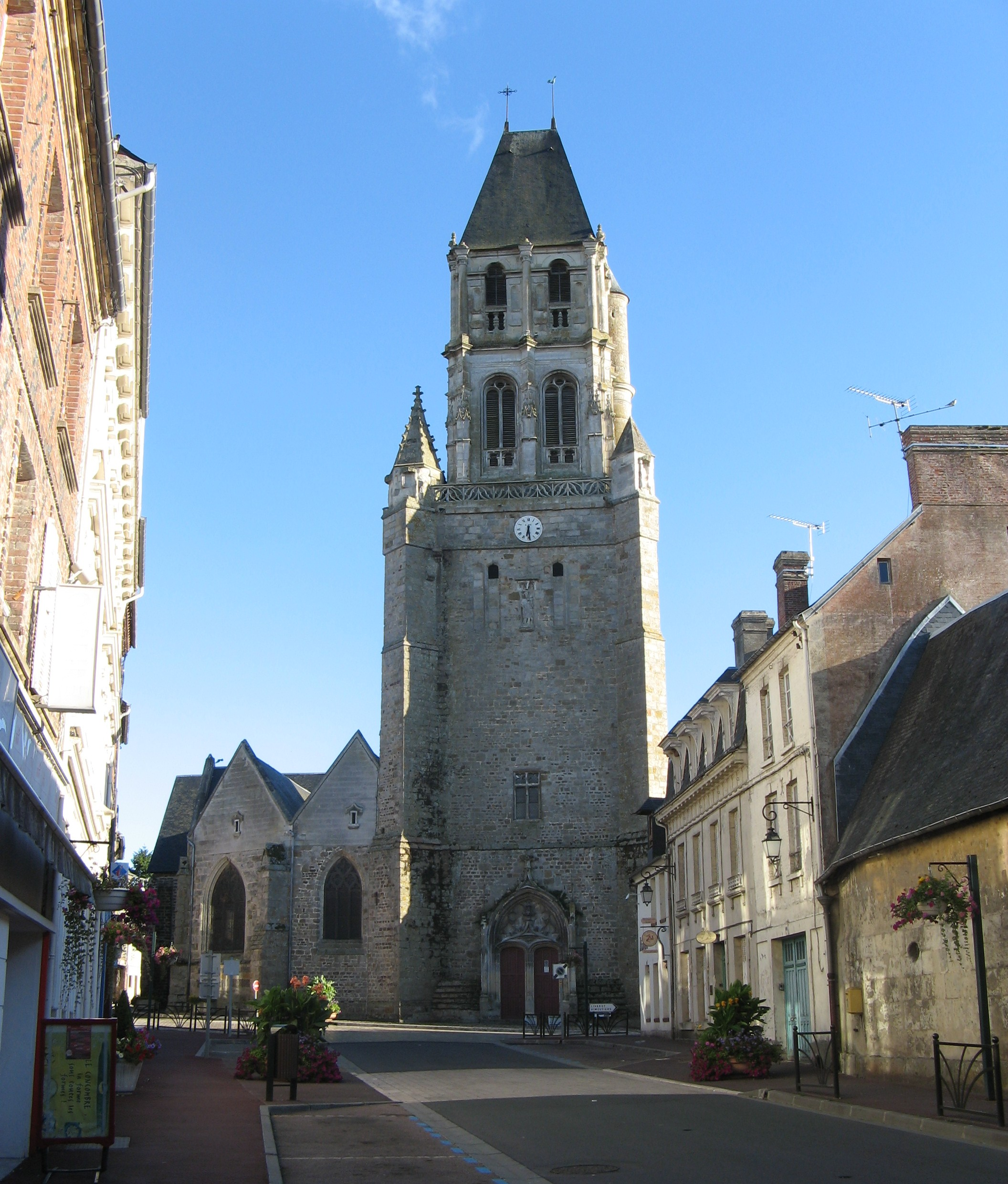 La cathédrale Notre-Dame d'Orbec.